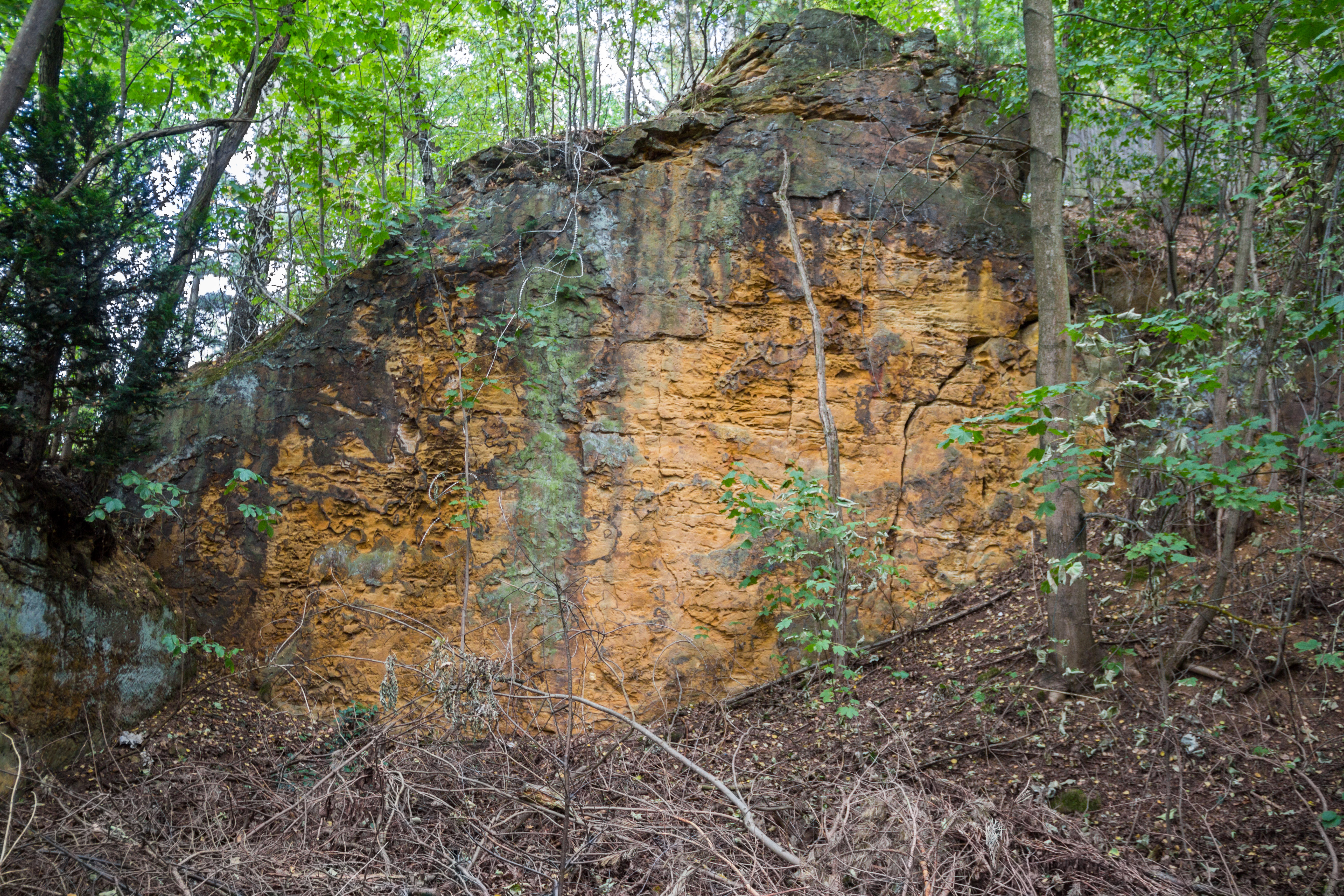 Steinbruch, Schwandorf, Geotop